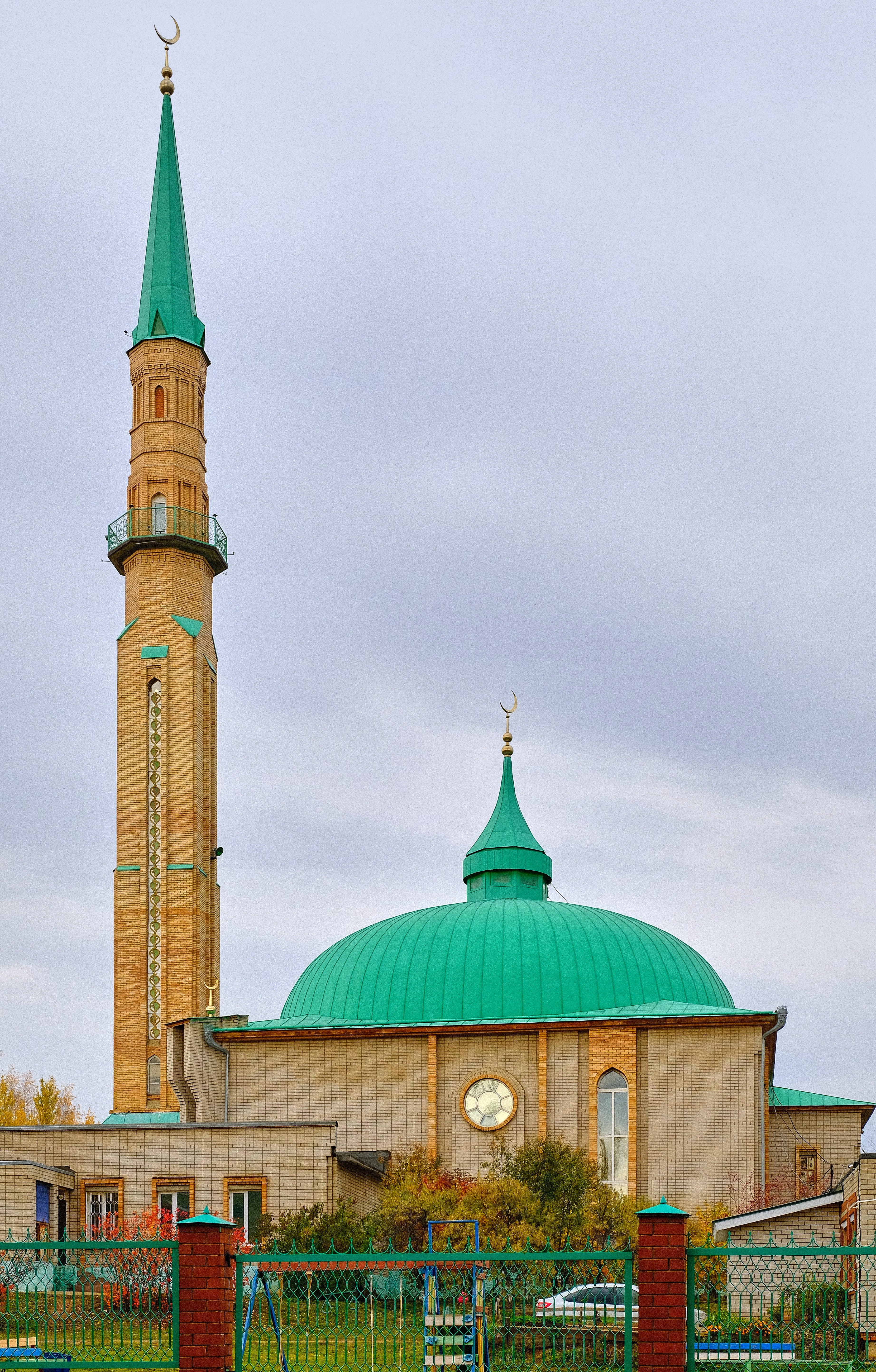 Мечеть "Жамиг" в Елабуге